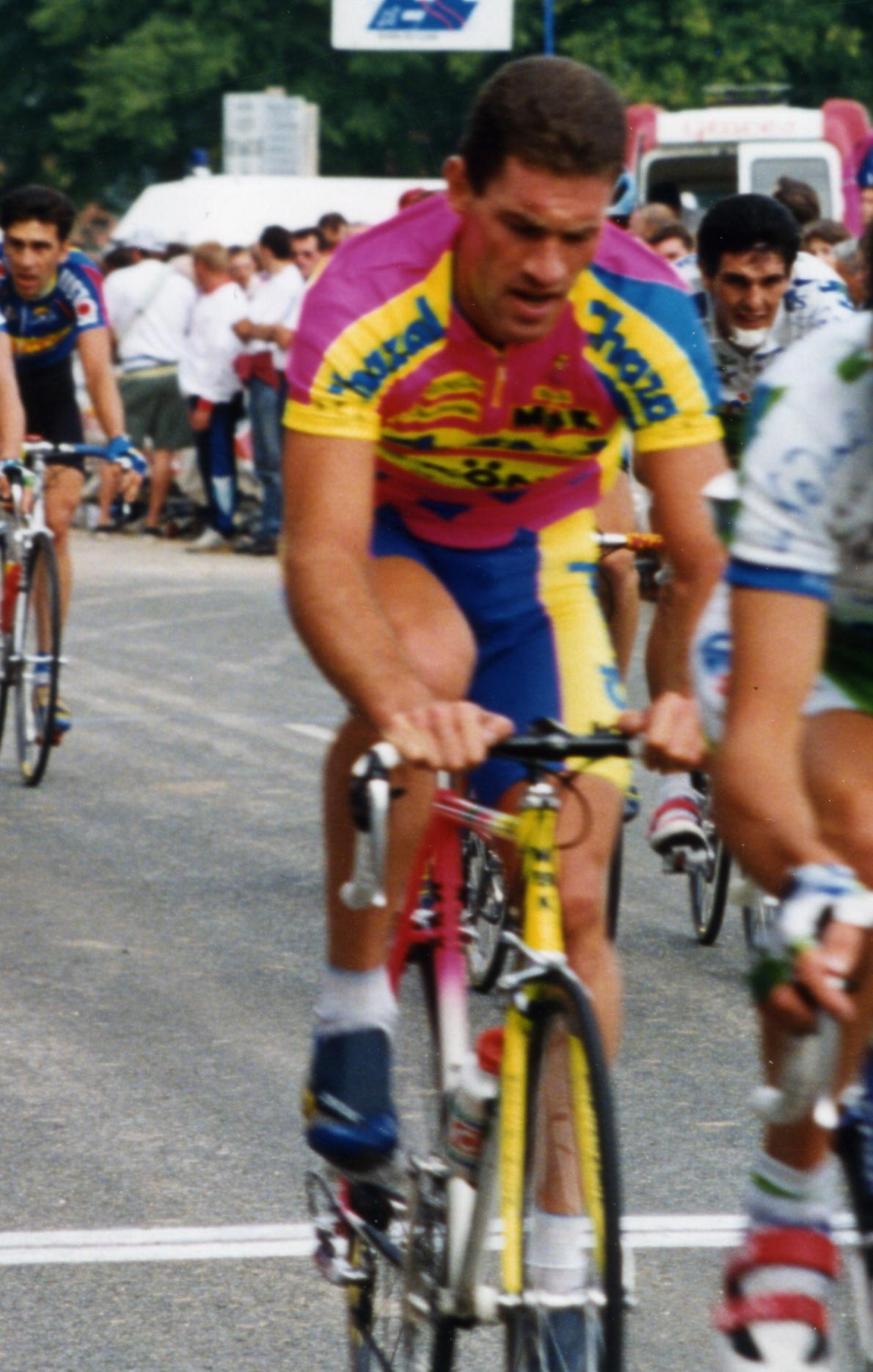 CRITERIUM DE LEVES 1994